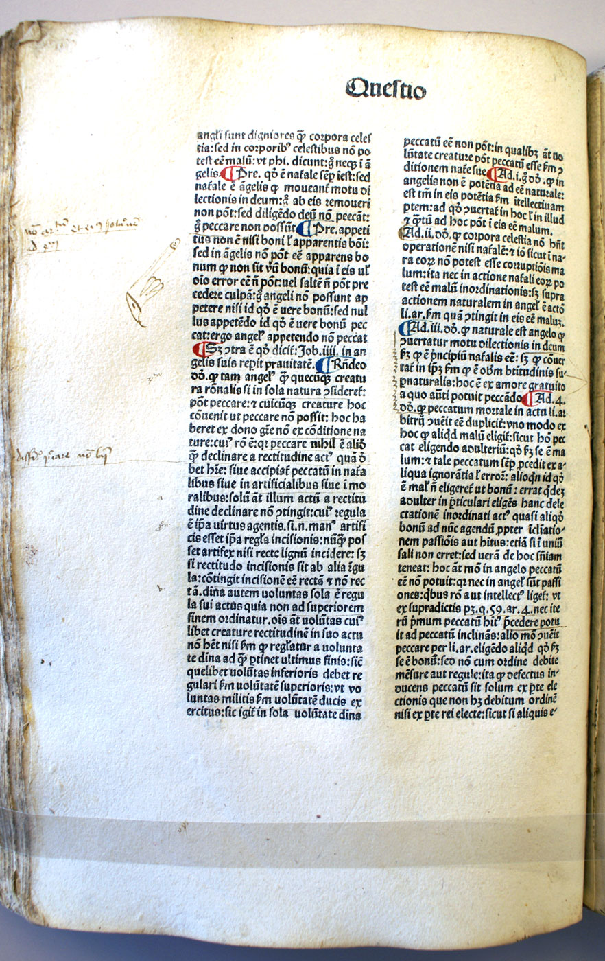 Summa theologica, Thomas d'Aquin, Venise, 1477. (Coll. Queen's University)